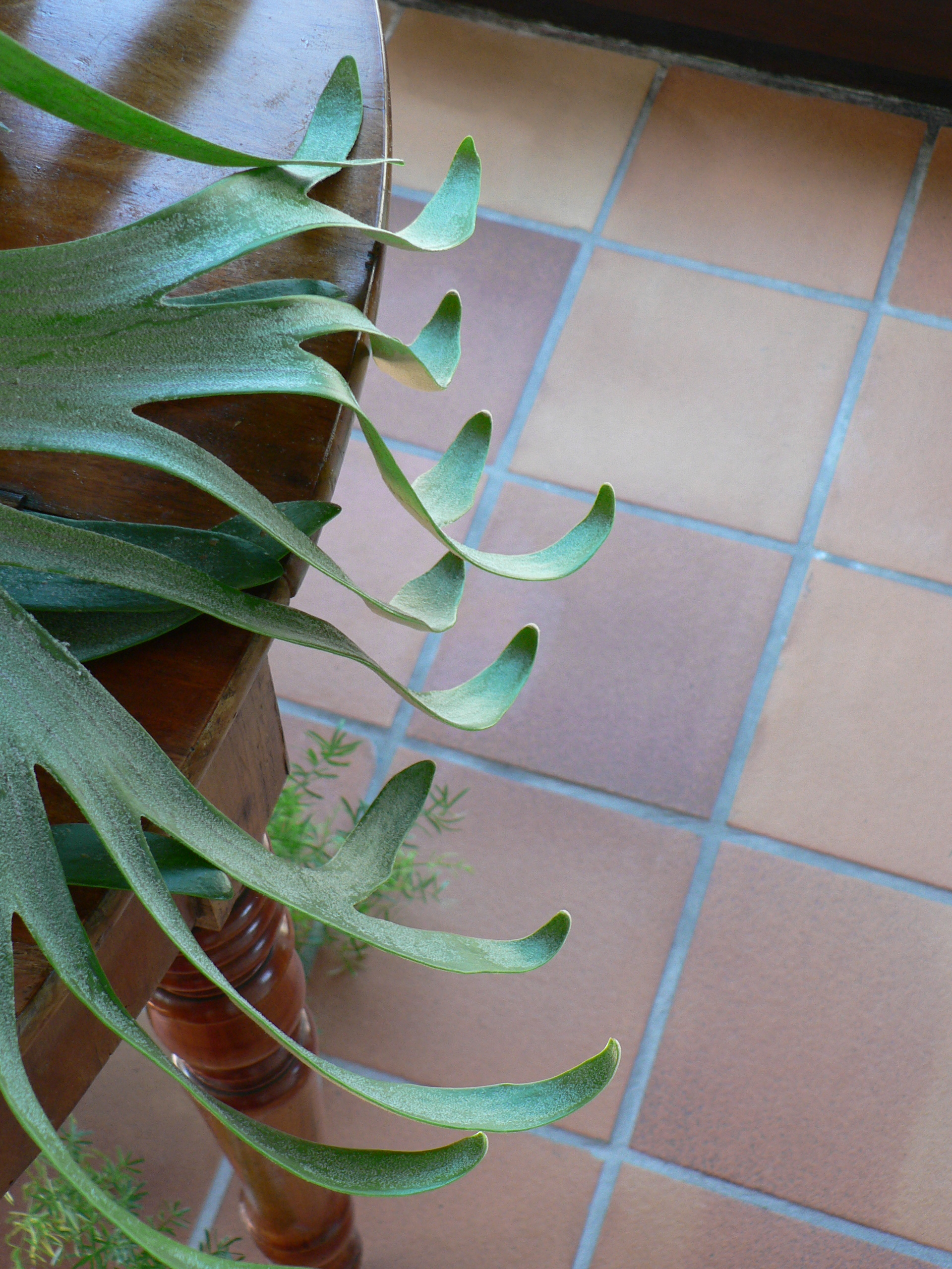 Platycerium bifurcatum leaf tips